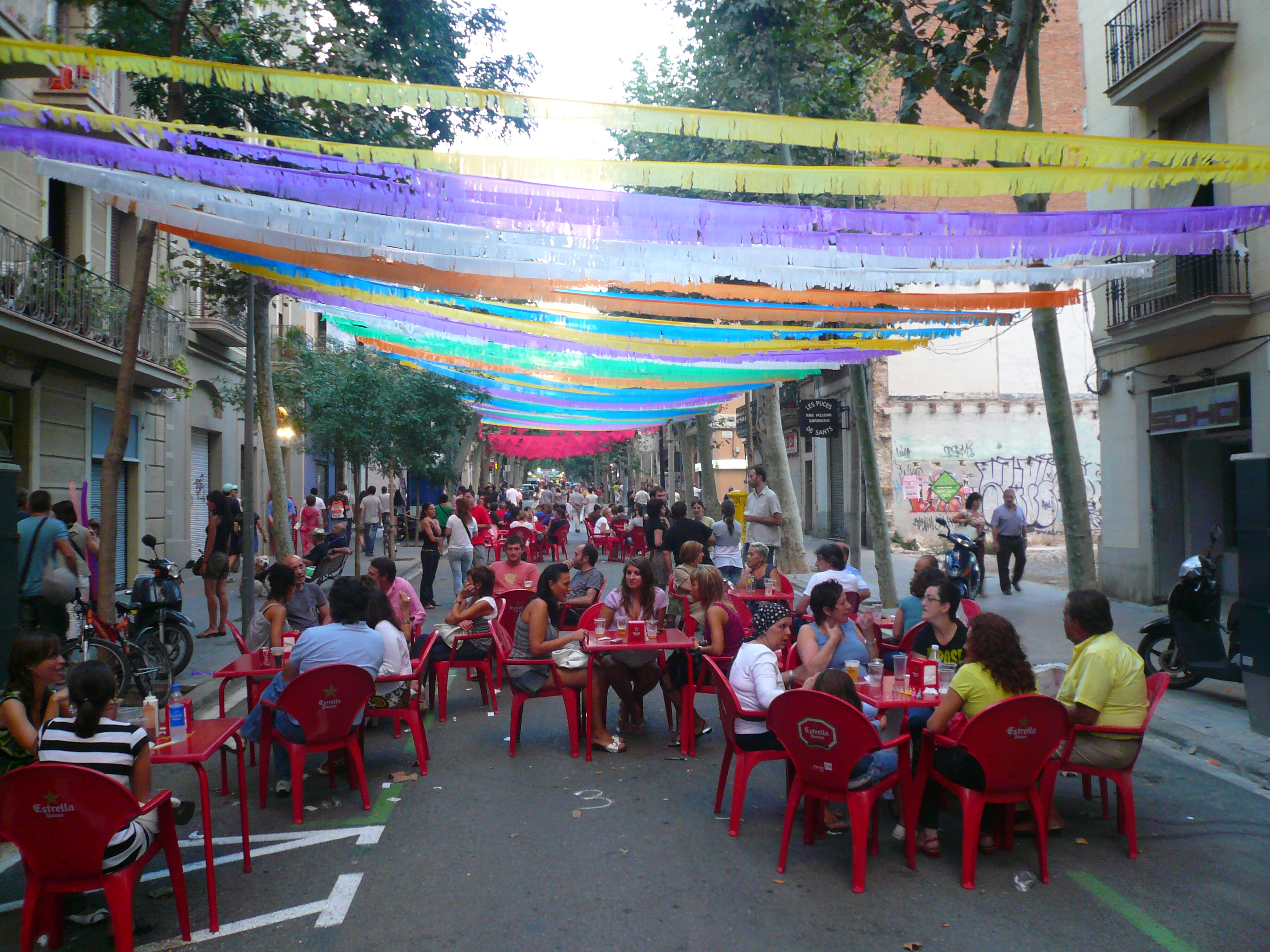 Carrers guarnits per la festa major de Sants del 2008